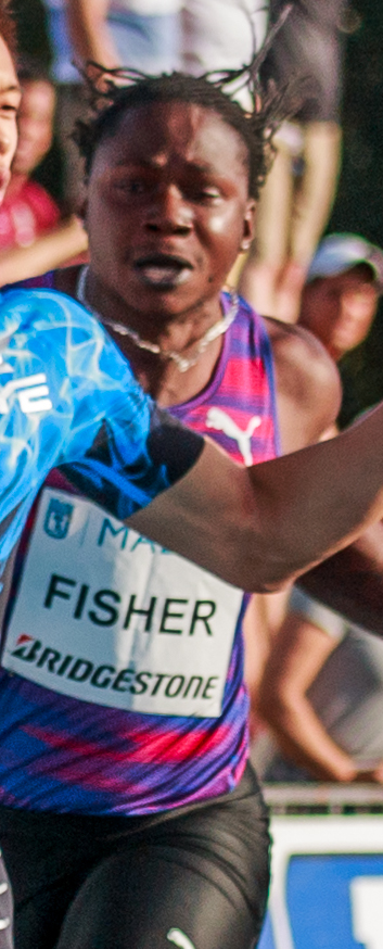 Andrew Fisher (BHR). 100m (semifinal 2). IAAF World Challenge. Meeting Madrid 2017. Moratalaz, Madrid.